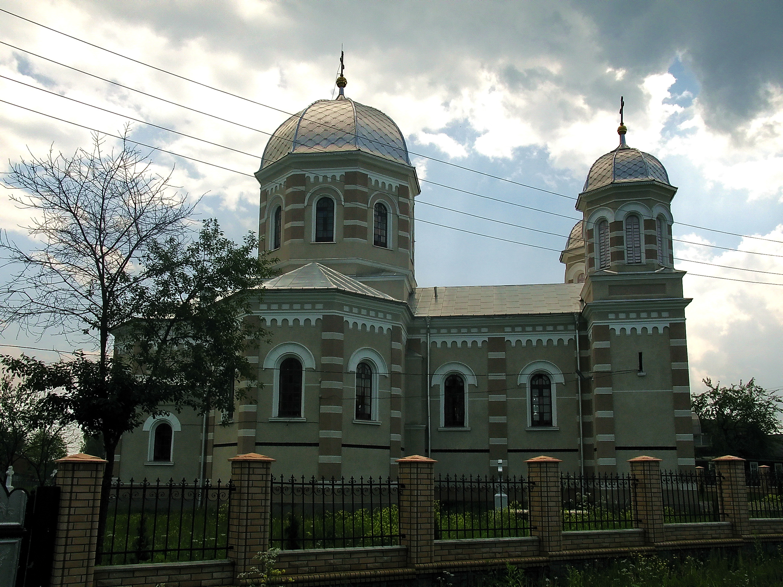 Biserica „Cuvioasa Paraschiva” din Pătrăuții de Sus, raionul Storojineț, regiunea Cernăuți, Ucraina